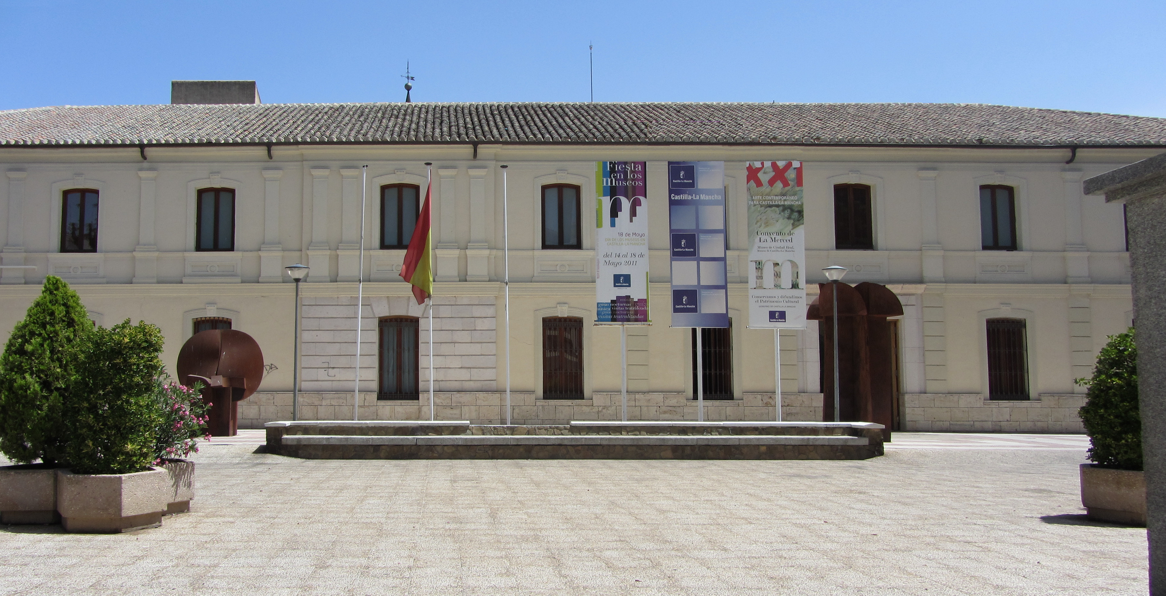 Convento de la Merced en Ciudad Real (España) fundado en 1613, actual Museo de la Merced.